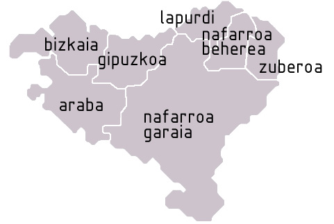 vascongadas-navarra-franciako zazpi lurraldeen kokapena